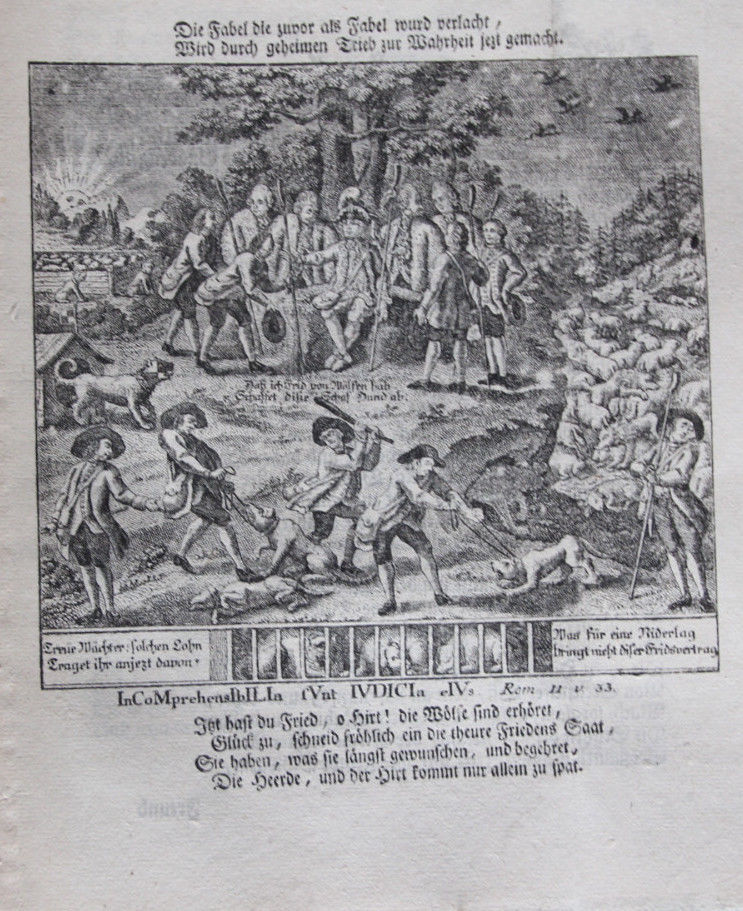 Deutsches Flugblatt zur Aufhebung des Jesuitenordens; das lateinische Chronogramm aus Römer 11:33 (Incomprehensibilia sunt iudicia eius - Unbegreiflich sind seine Entscheidungen) ergibt die Jahreszahl 1774. Das Bild und der Text in alexandrinischen Versen vergleichen Papst Clemens XIV. mit einem Hirten, der auf Wunsch der Wölfe seine Hütehunde einsperrt.